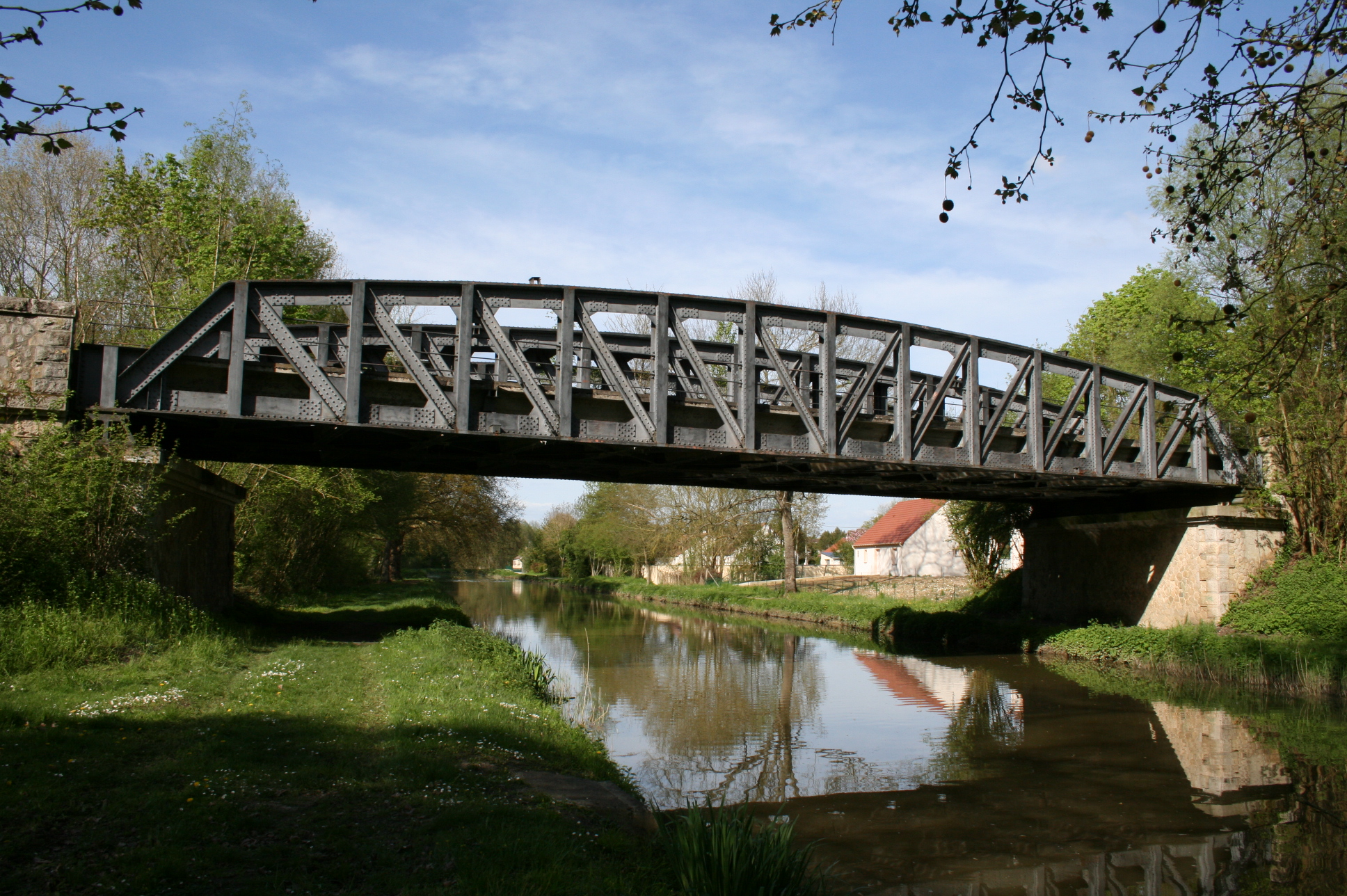 Pont double de Pannes – Commune de Pannes – Département du Loiret – France – sur ligne SNCF désaffectée